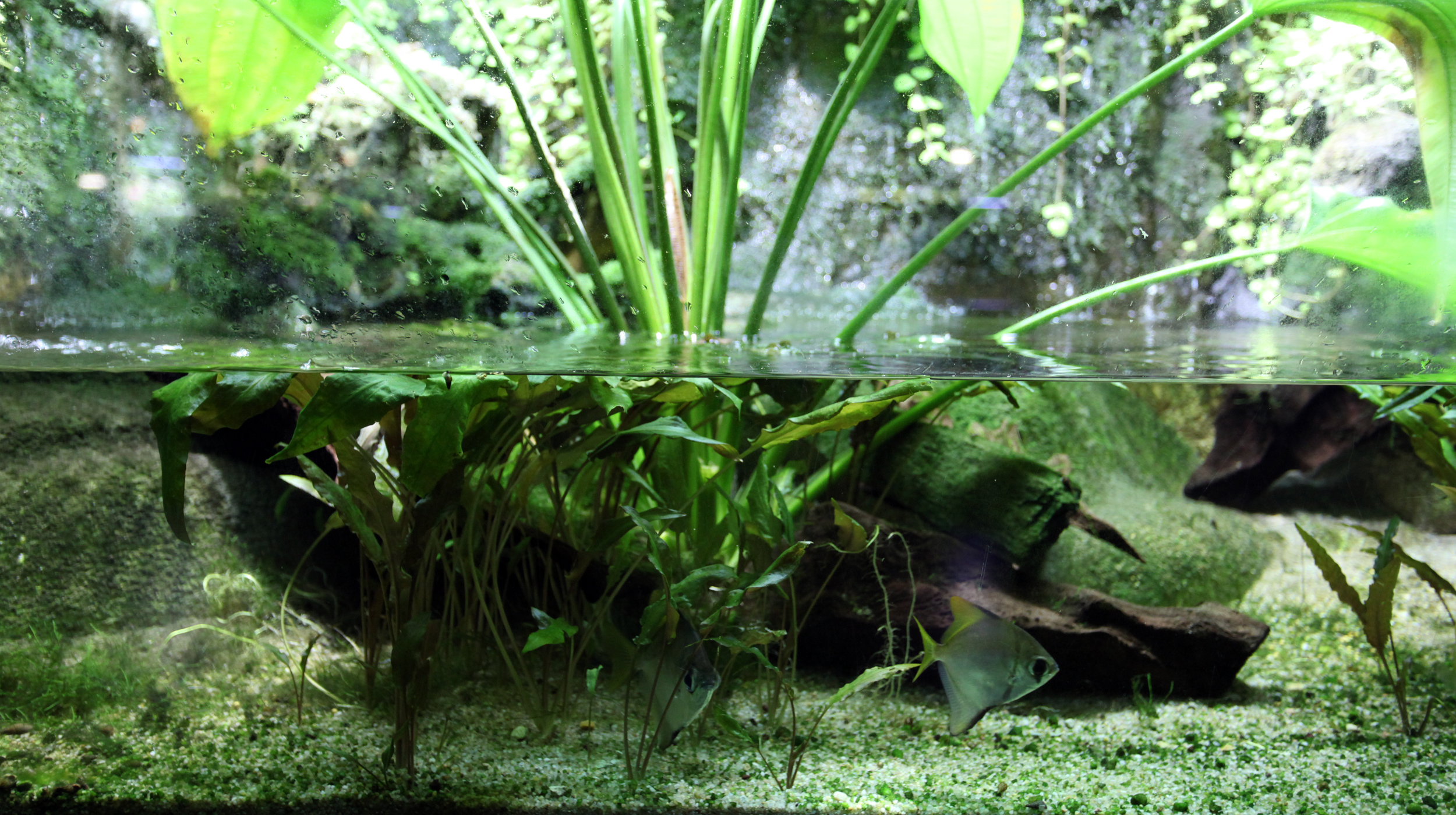 Monodactylus argenteus